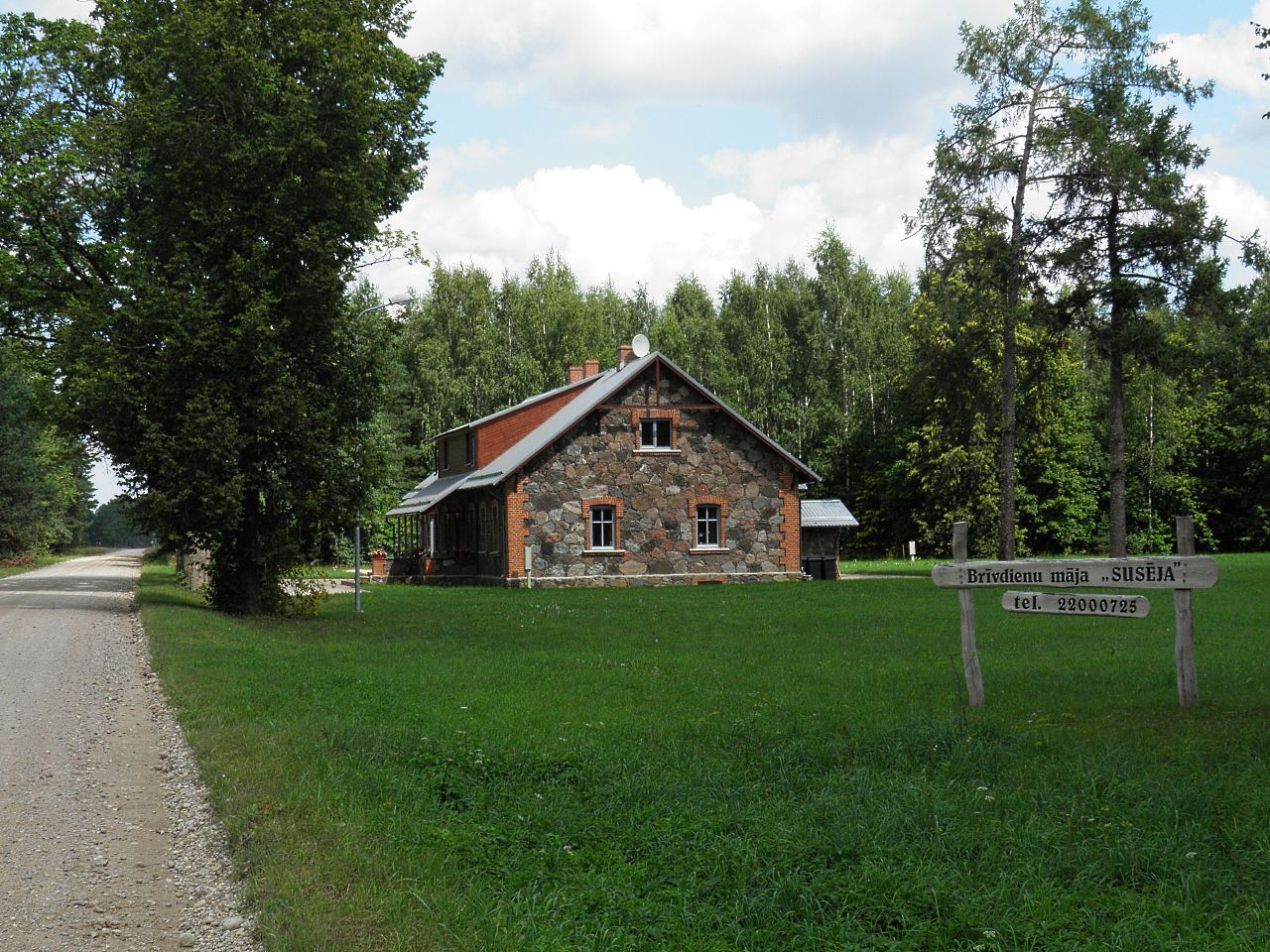 Brīvdienu māja "Susēja" (2)